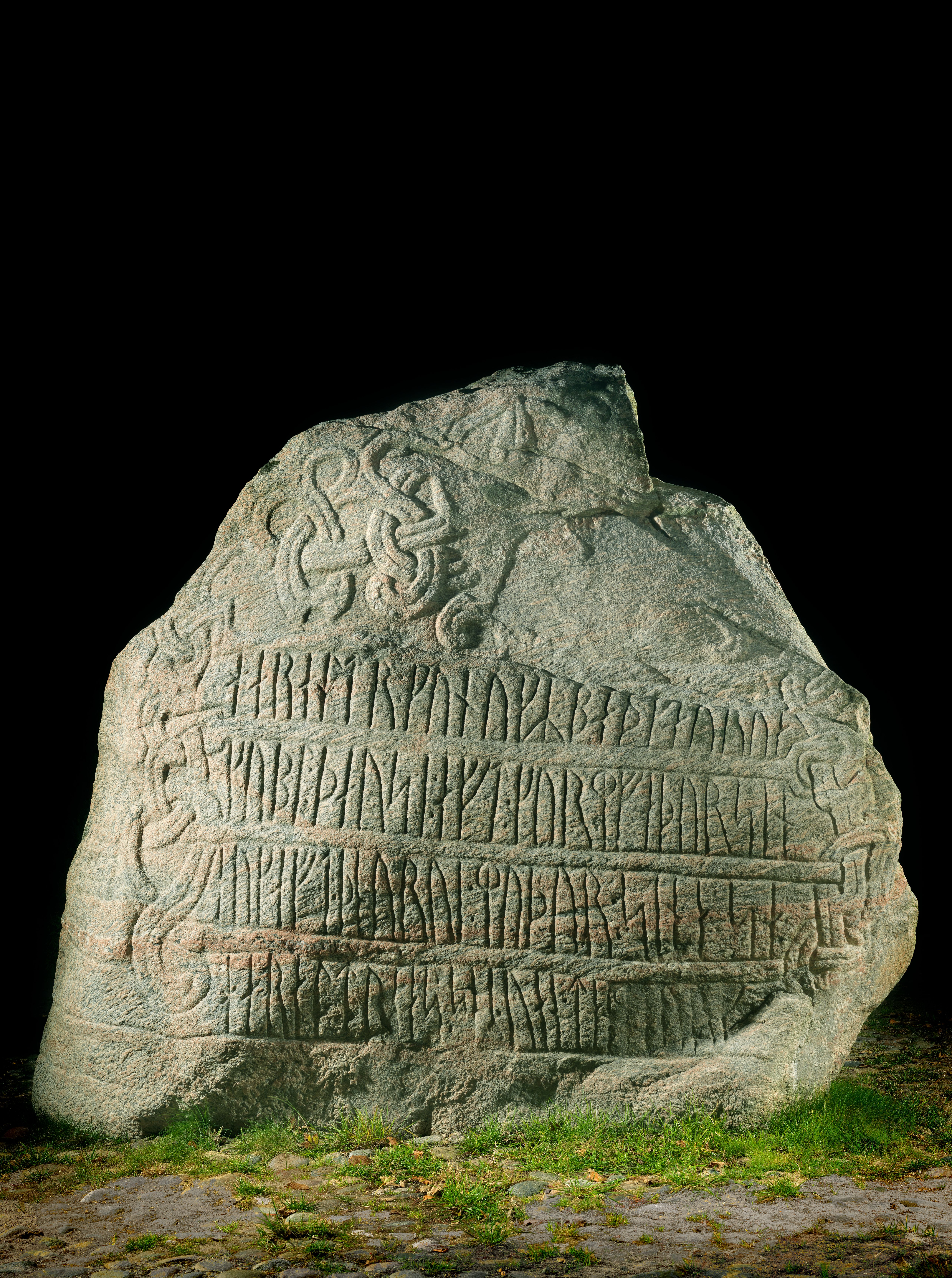 Foto af Roberto Fortuna 2012